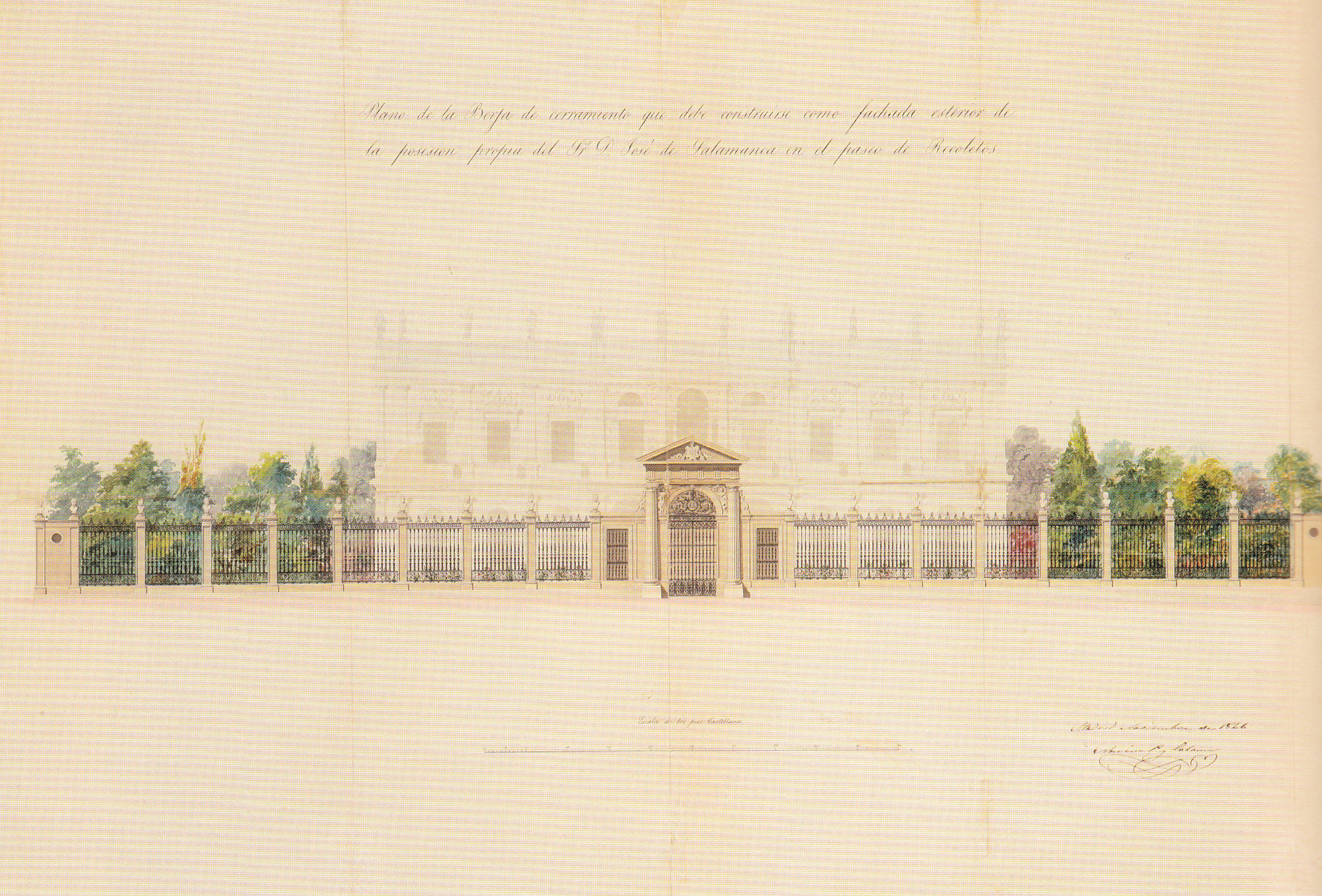 Plano de la verja de cerramiento que debe construirse como fachada exterior de la posesión propia del Sr. José de Salamanca en el Paseo de Recoletos Noviembre 1846 Dibujo a lápiz, tinta china y acuarela AVM (Archivo de la Villa de Madrid) 4-89-40